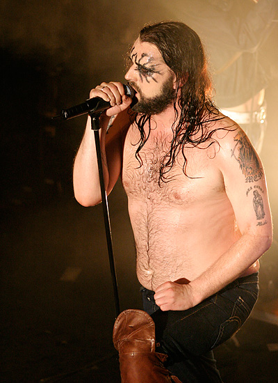 Turboneger på Folken, Stavanger, 2. mai 2005.